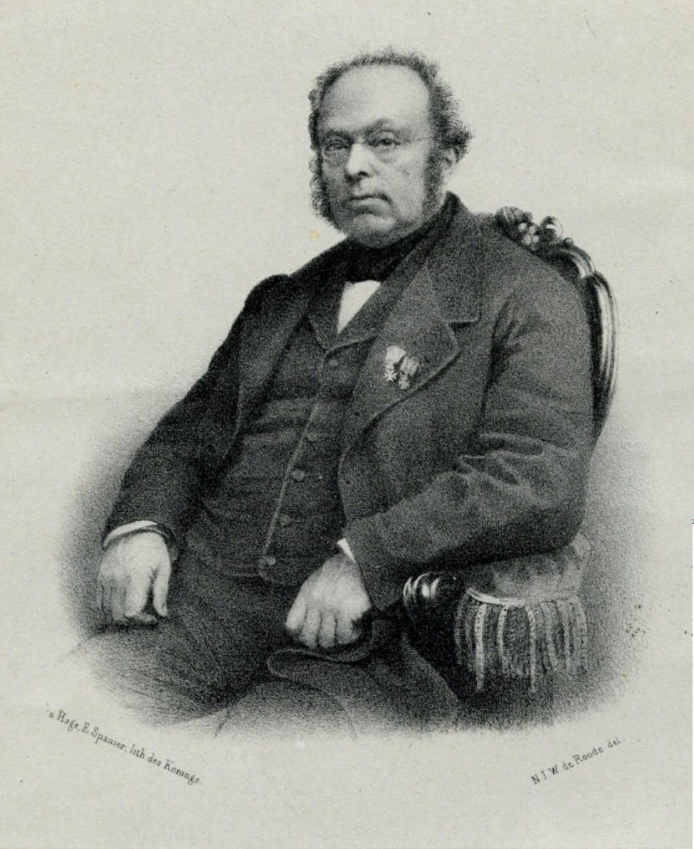 B.W.A.E.Sloet tot Oldhuis, gepubliceerd vóór in het verslag van het XXVII-ste Nederlandsch Landhuishoudkundig Congres, dat in 1862 in Middelburg werd gehouden.